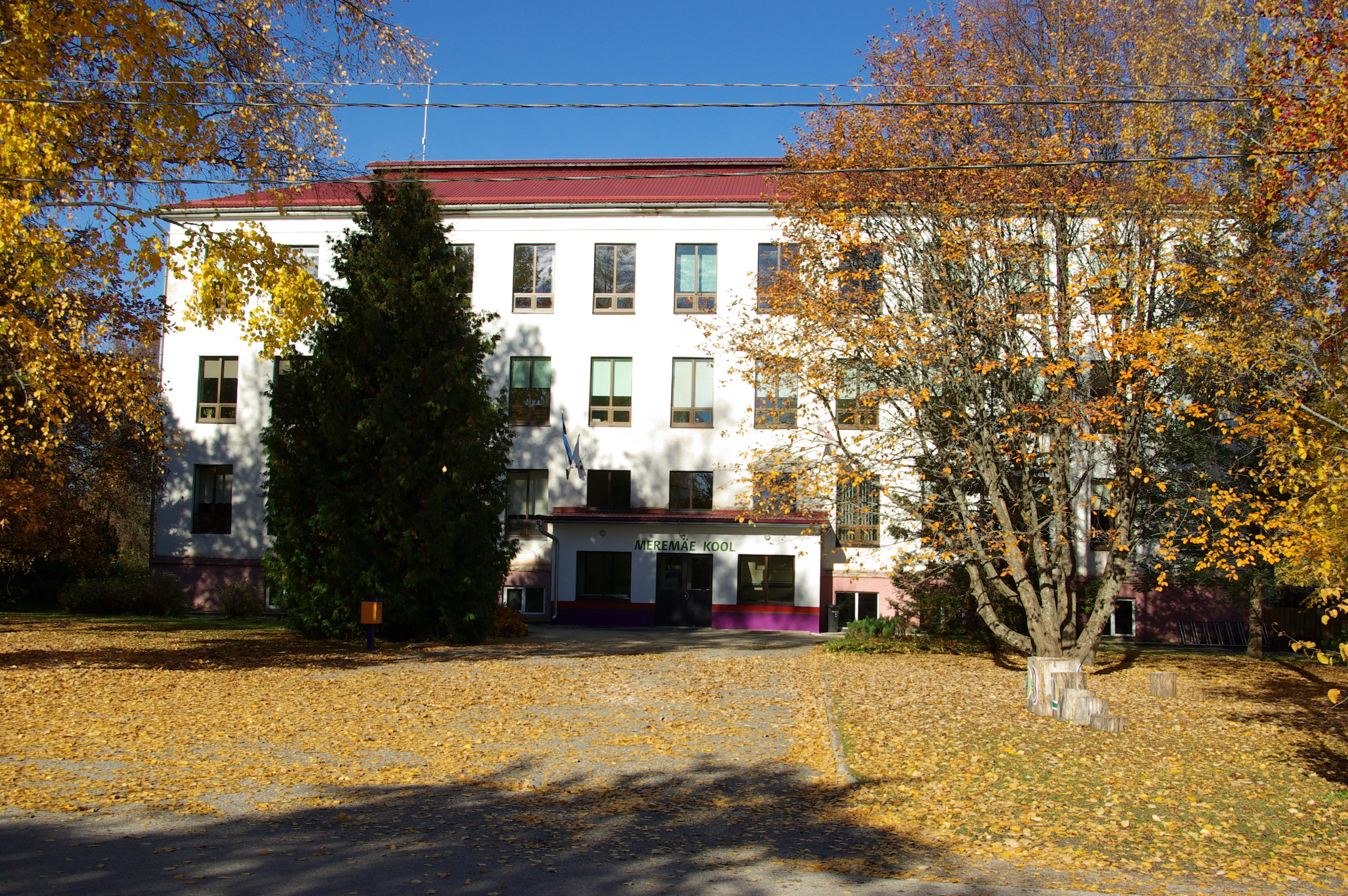 Meremäe kool